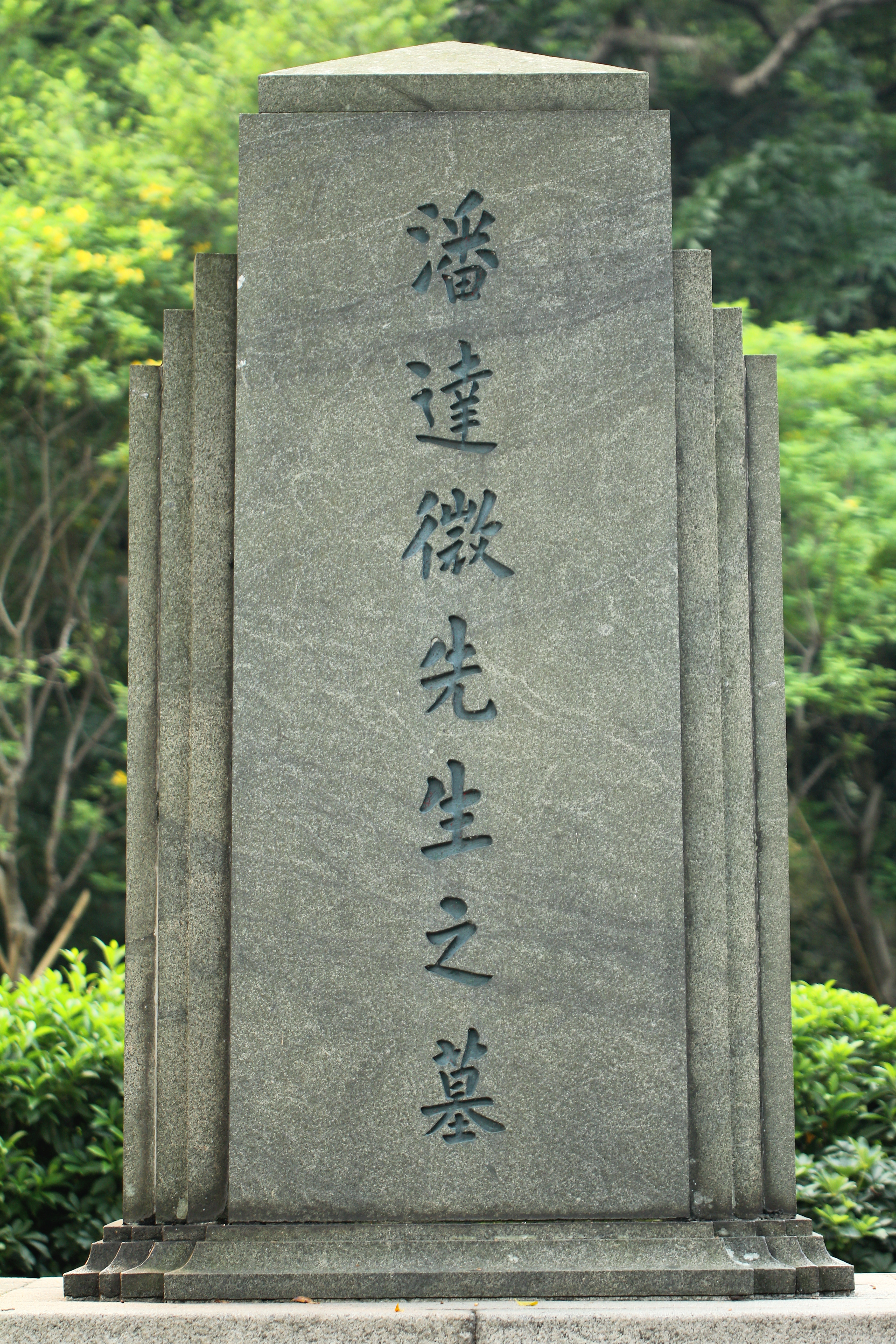 潘達徽先生之墓碑